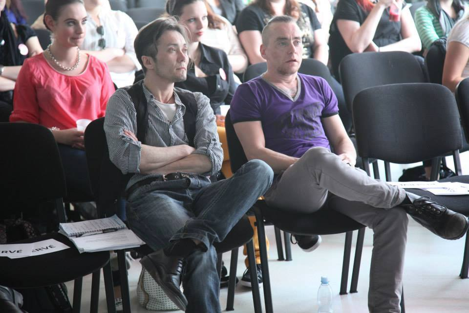 Drag Addicts - Zlin, Skrz Prsty Festival diskuze